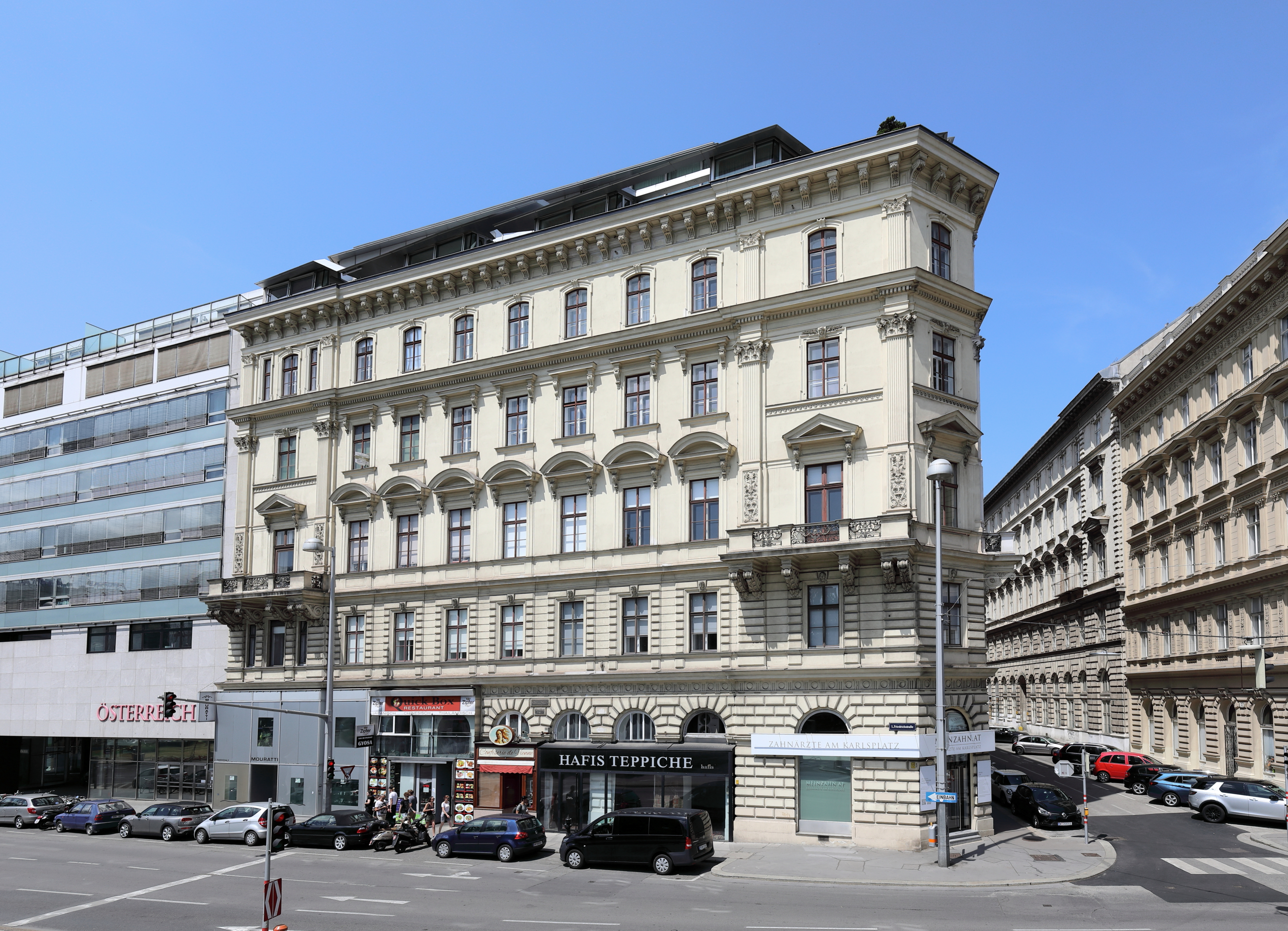 Das Miethaus an der Adresse Friedrichstraße 8 / Nibelungengasse 1-3 / Makartgasse 1, auch als „Nibelungenhof“ bezeichnet, im 1. Wiener Bezirk Innere Stadt. Das Gebäude wurde 1870 nach Plänen des Architekten August Schwendenwein von Lanauberg errichtet.